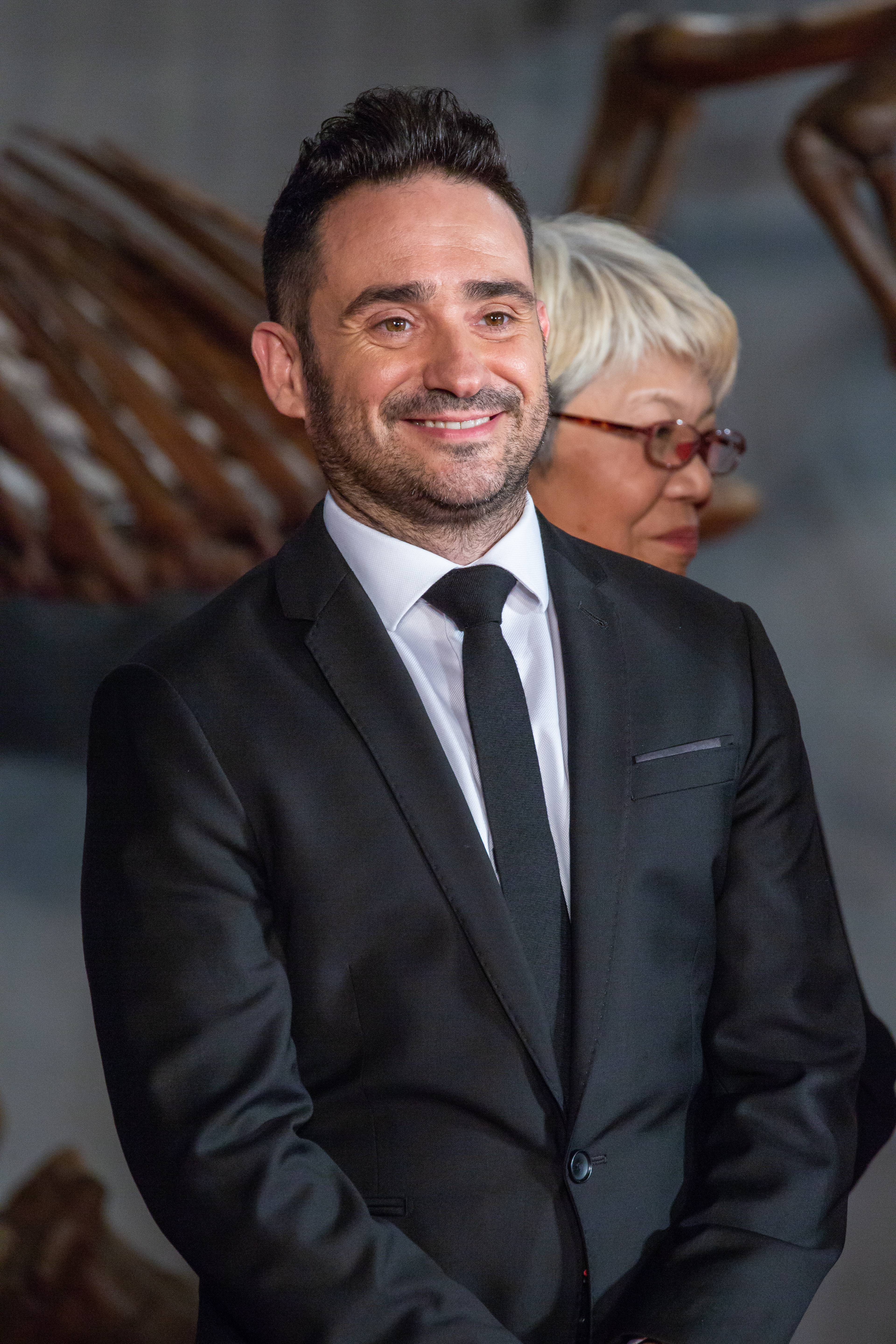 ジュラシック・ワールド/炎の王国 ジャパン・プレミア レッドカーペット J・A・バヨナ